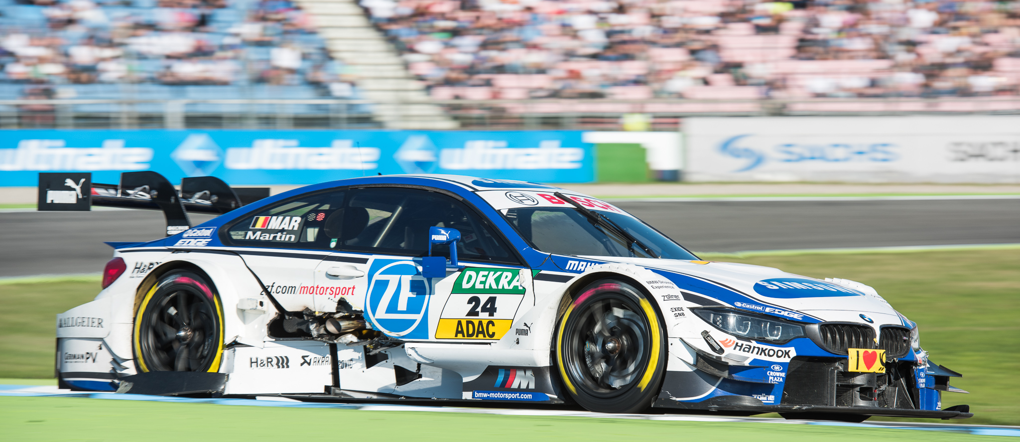 DTM,Deutsche Tourenwagen Masters,Hockenheimring,Maxime Martin,Motorsport,RMG,Reinhold Motorsport GmbH,Samsung BMW M4 DTM